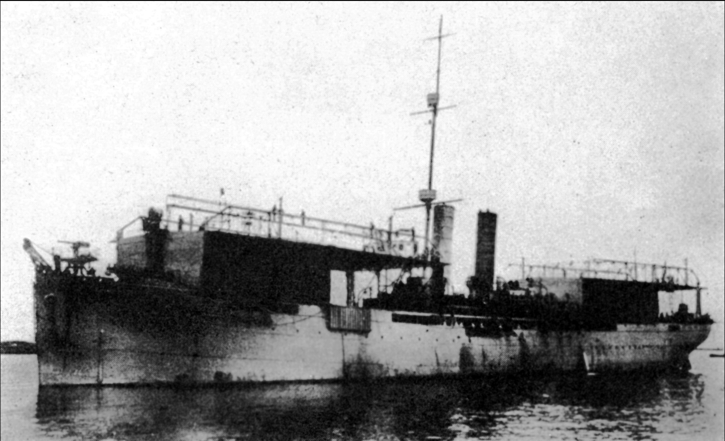 Nave appoggio idrovolanti Europa (1915-1920)